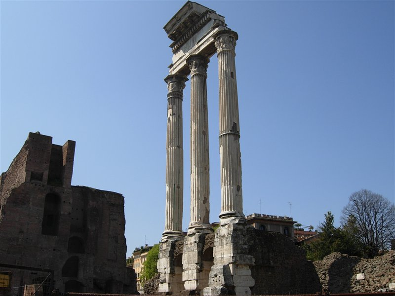 Rome Roman Forum